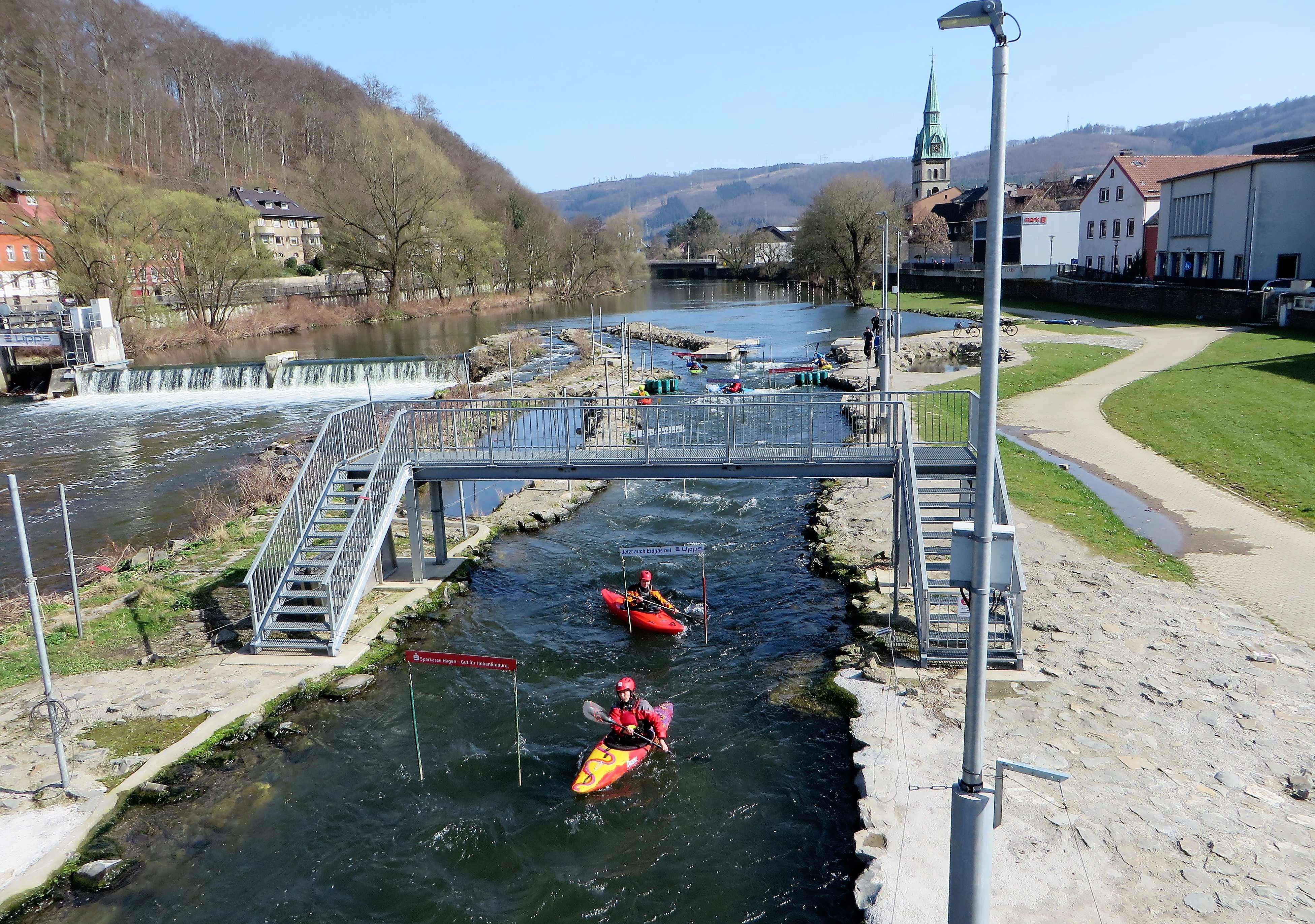 Blick von der Stennertbrücke auf die Lenne im Hagener Stadtteil Hohenlimburg mit dem Startbereich vom Wildwasserpark.